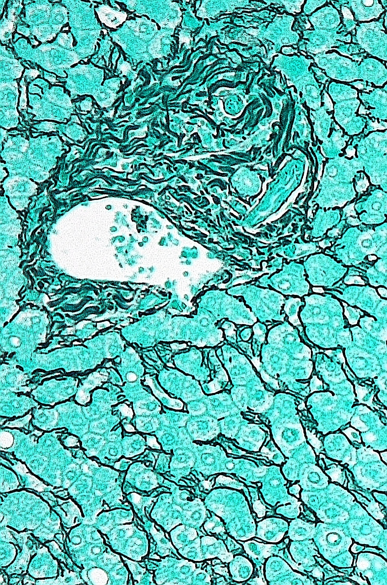 Hígado. Fibrina.